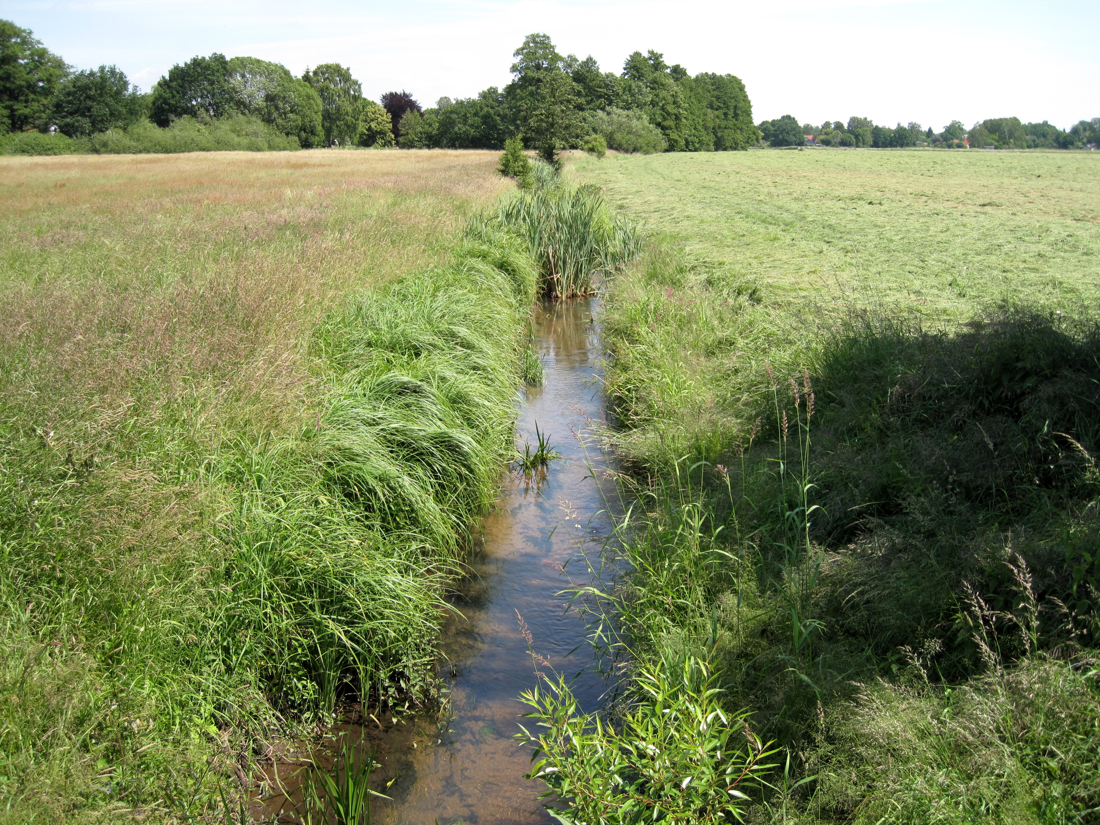 Panke im Stenerbruch in Berlin-Buch